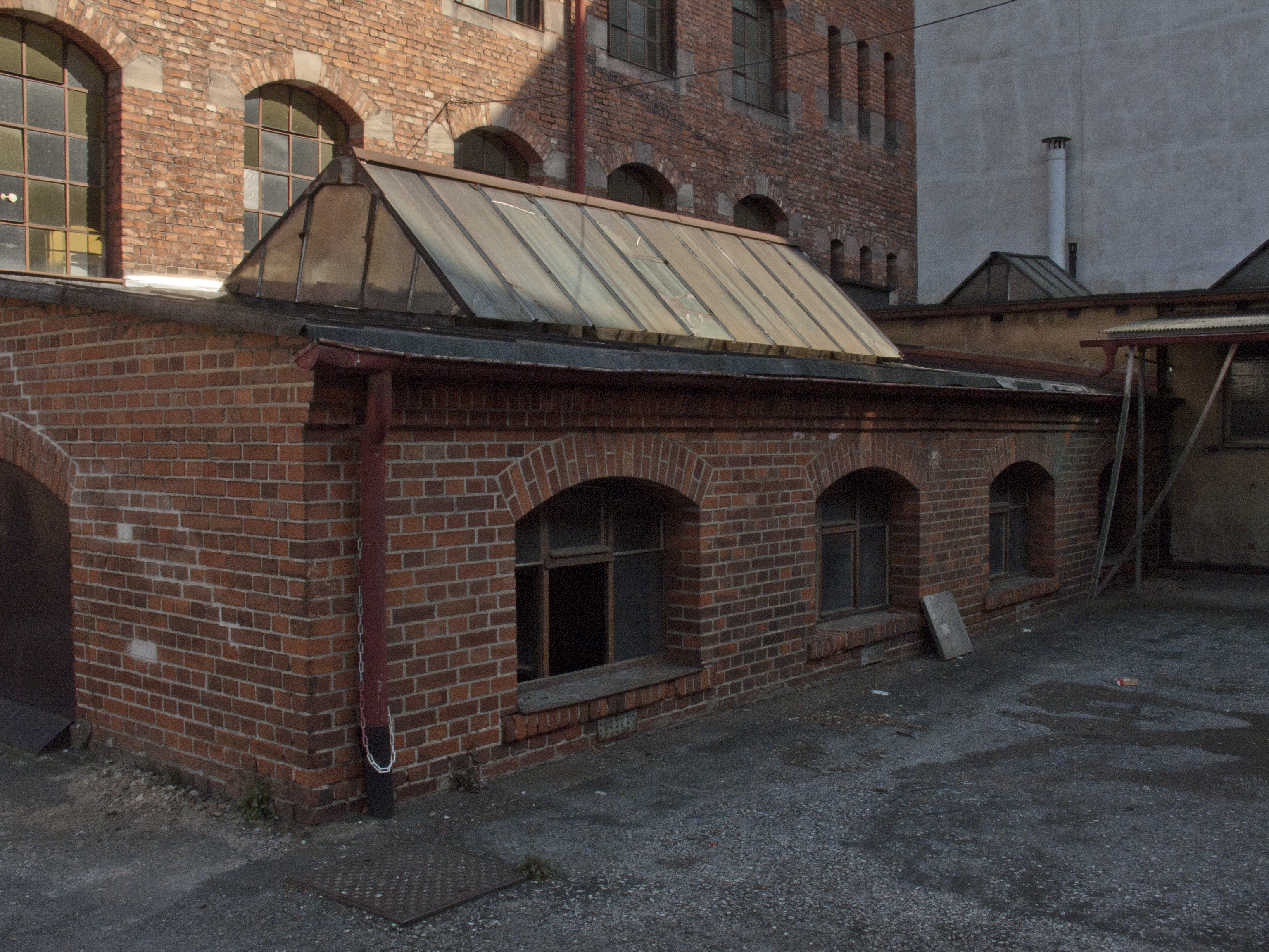 Nürnberg-St. Johannis, Anwesen Rieterstr. 41.